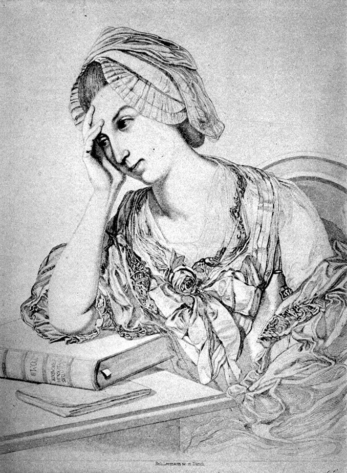 Johann Wolfgang von Goethes Freundin Barbara Schulthess aus Zürich. Stich von Rob. Leemann nach einem Porträt von Johann Heinrich Wilhelm Tischbein, Mai 1781